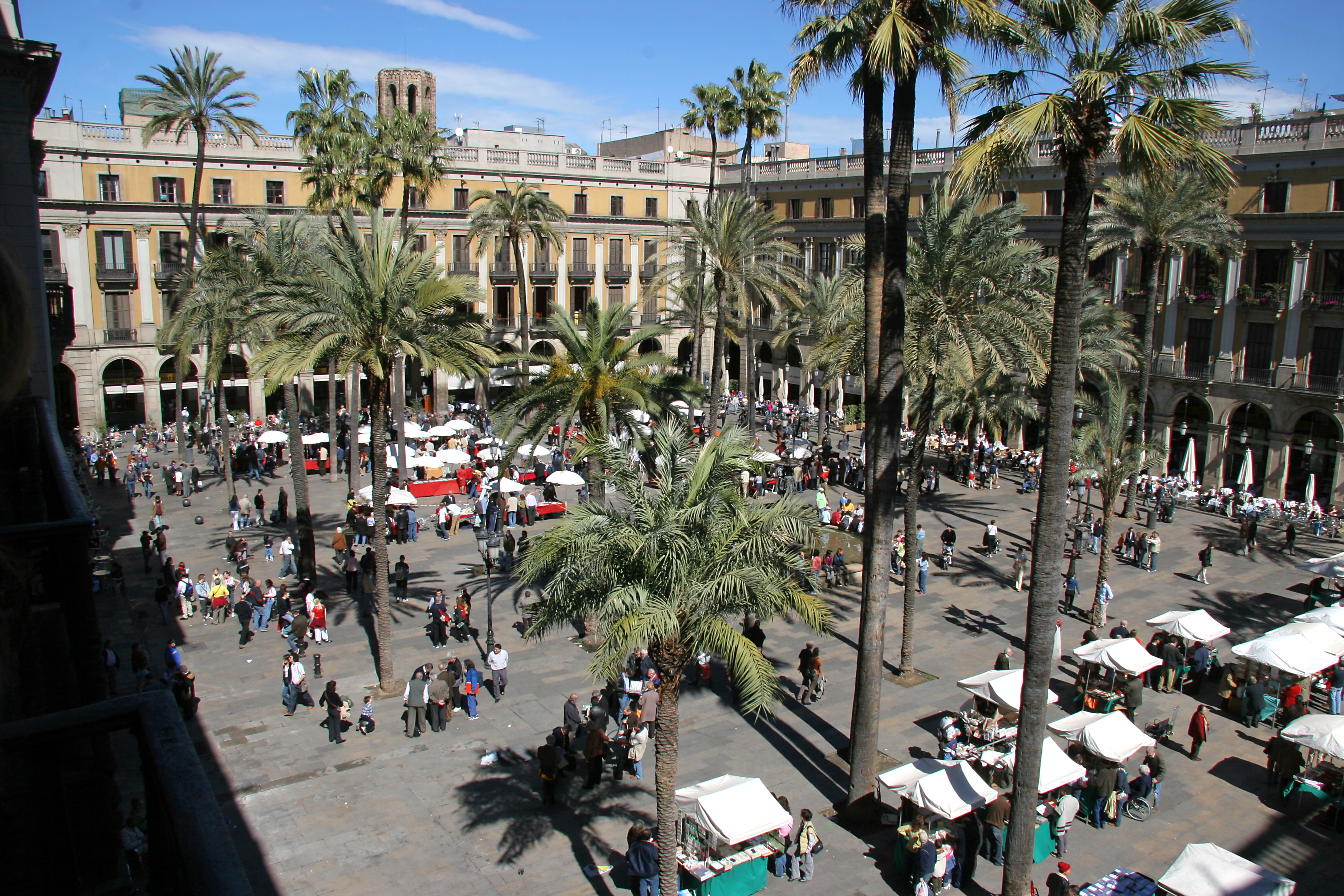 Blick auf den Plaza Real in Barcelona.